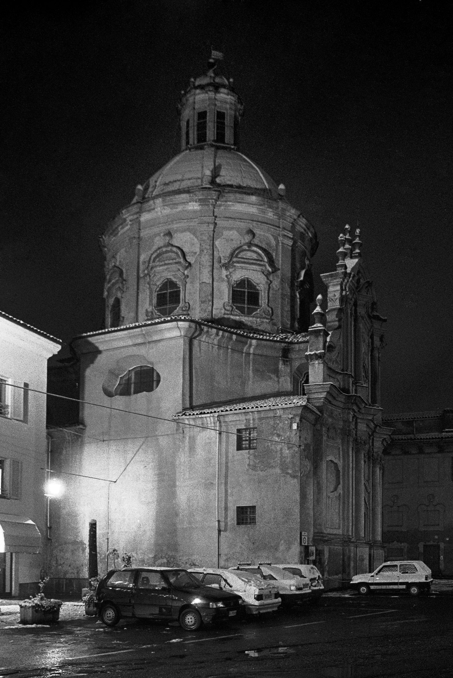 The church of Santa Caterina (officially Santa Maria delle Grazie), Piazza Castello, Casale Monferrato